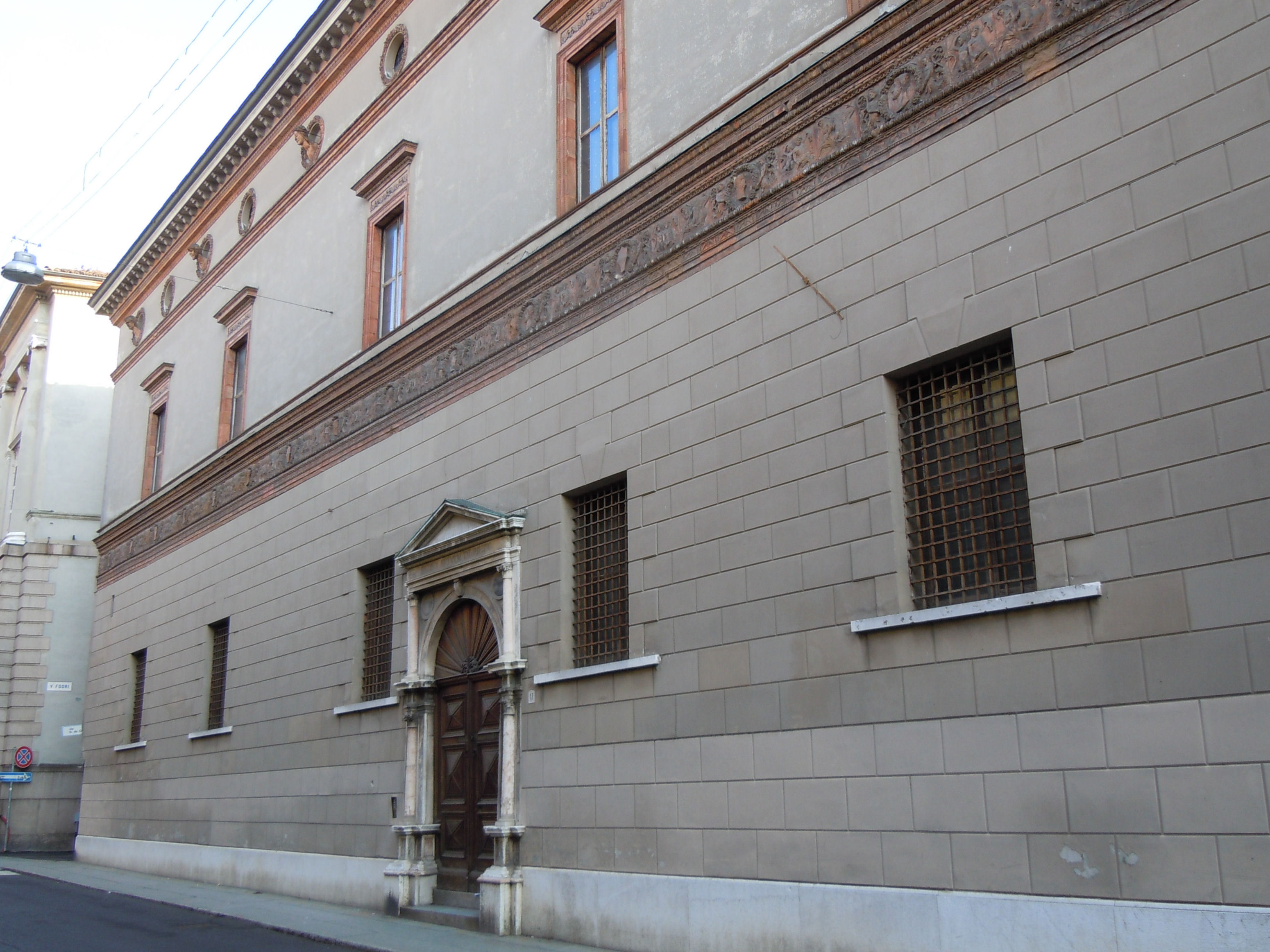 Cremona, Palazzo Fodri.